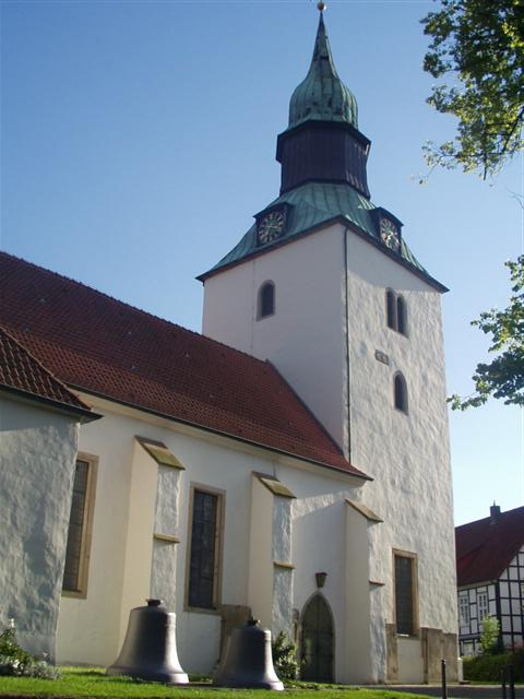 Bad Essen: St. Nikolaikirche; GNU-FDL: selbst fotografiert (Original text: St. Nikolaikirche freistehend auf dem Kirchplatz von Bad Essen, fotografiert am 19.06.2004) Andere Versionen